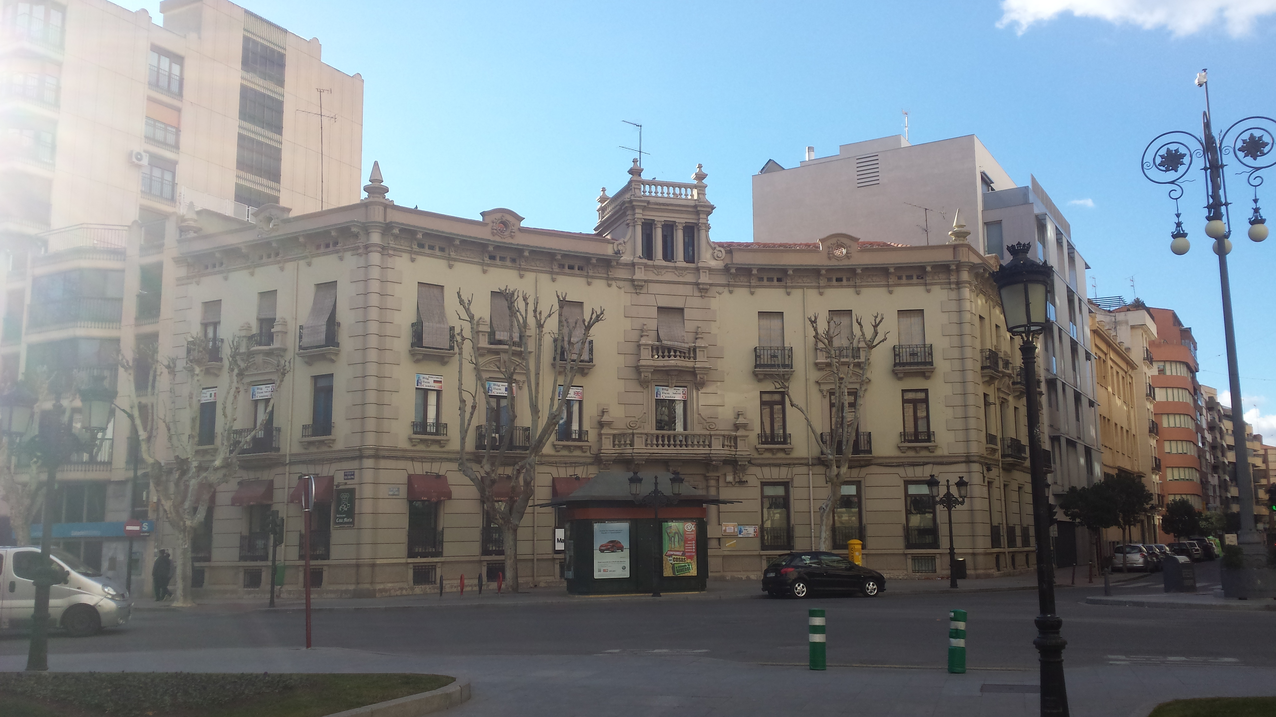 Edificio Casa Marlo